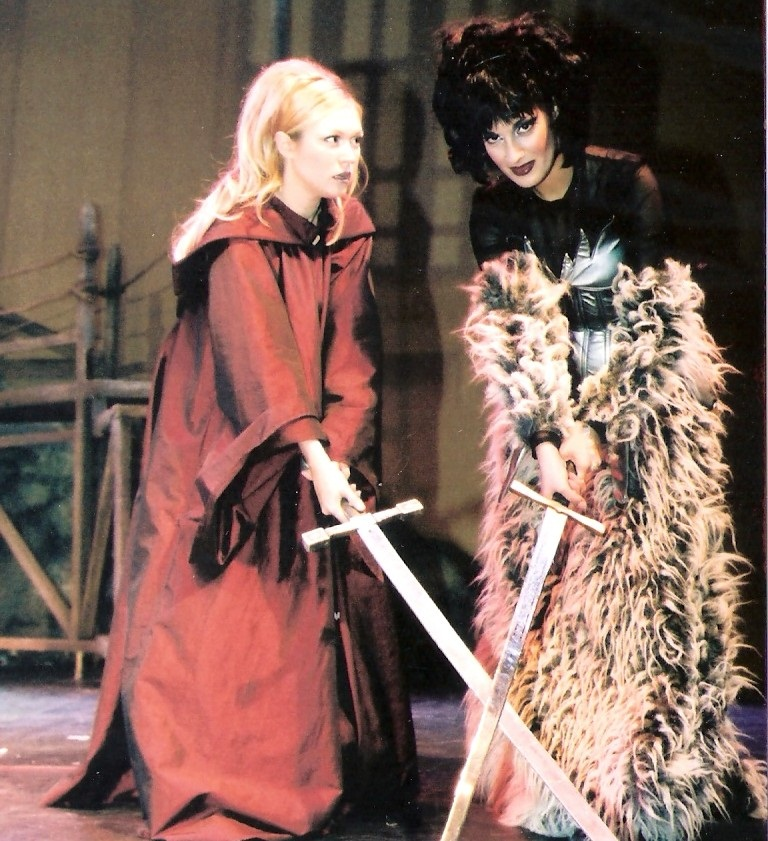 "מורגנה המכשפה " במחזמר "המלך ארתור ואבירי השולחן העגול " בבימוי ירון כפכפי ובהפקת יוכלמן אשר.